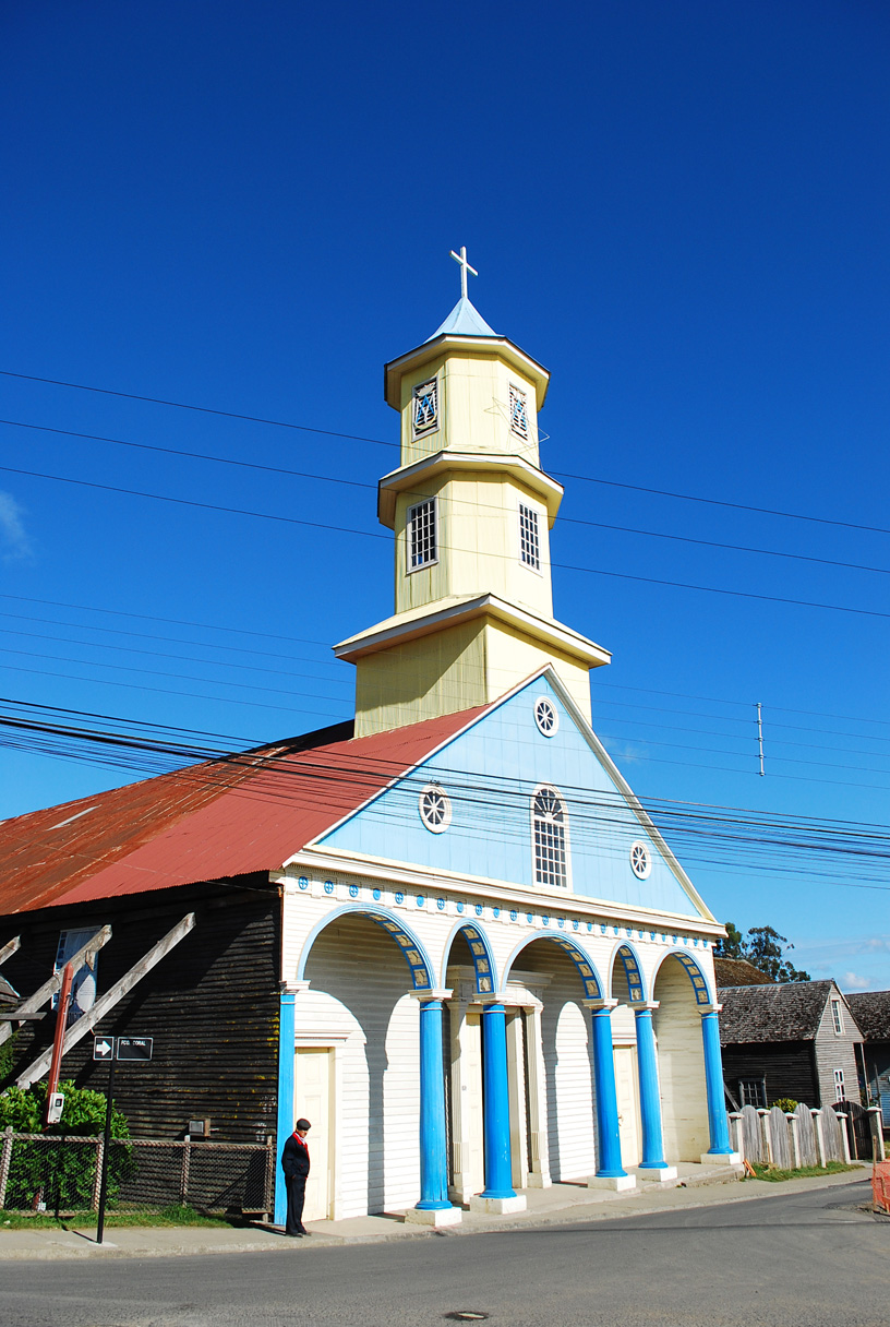 Kostel na ostrově Chiloé